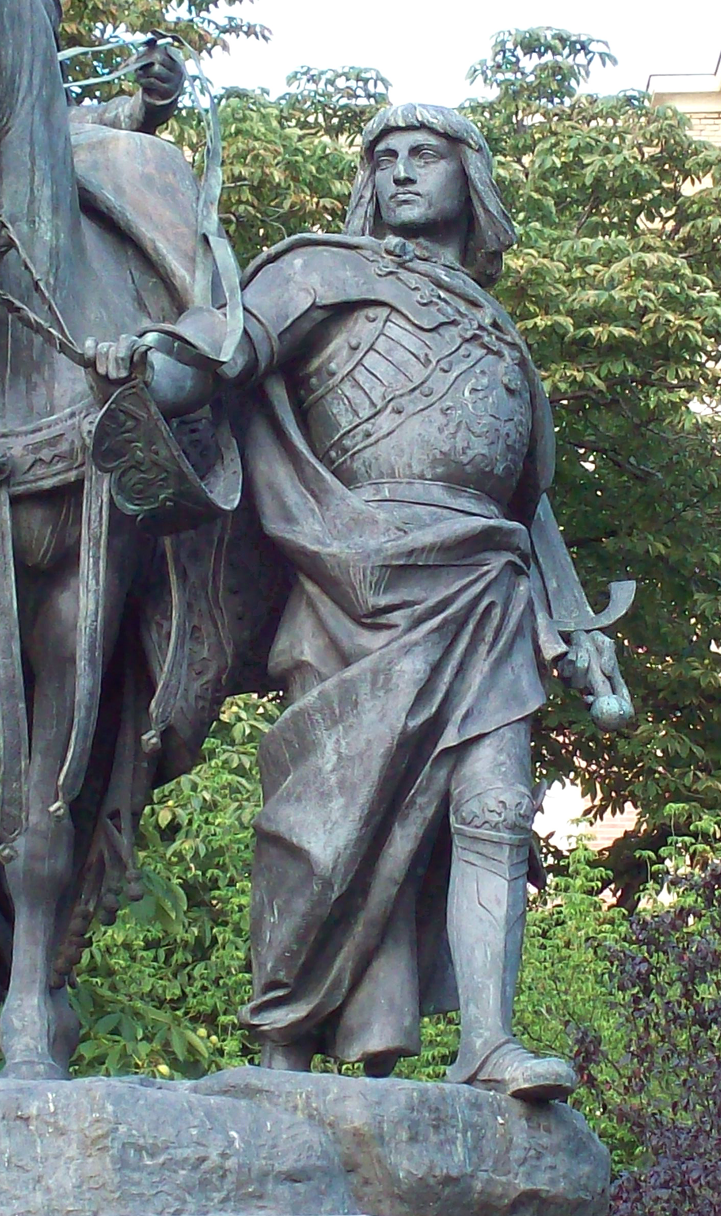 Depicted person: Gonzalo Fernández de Córdoba (1453–1515).